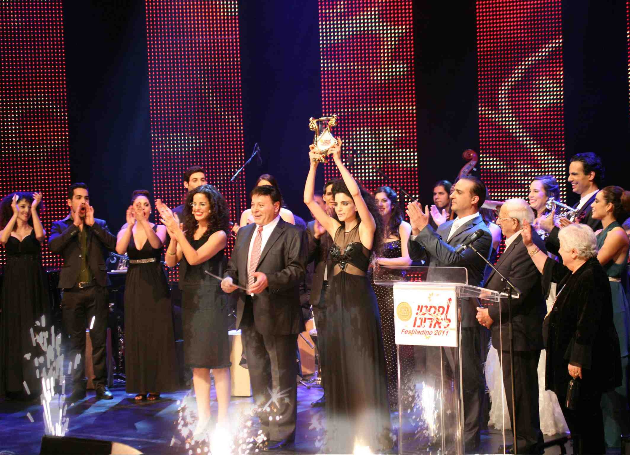 יעל בדש זוכה במקום הראשון בארוע העשור ל"פסטילאדינו" עם השיר "La Lingua de Kaza")